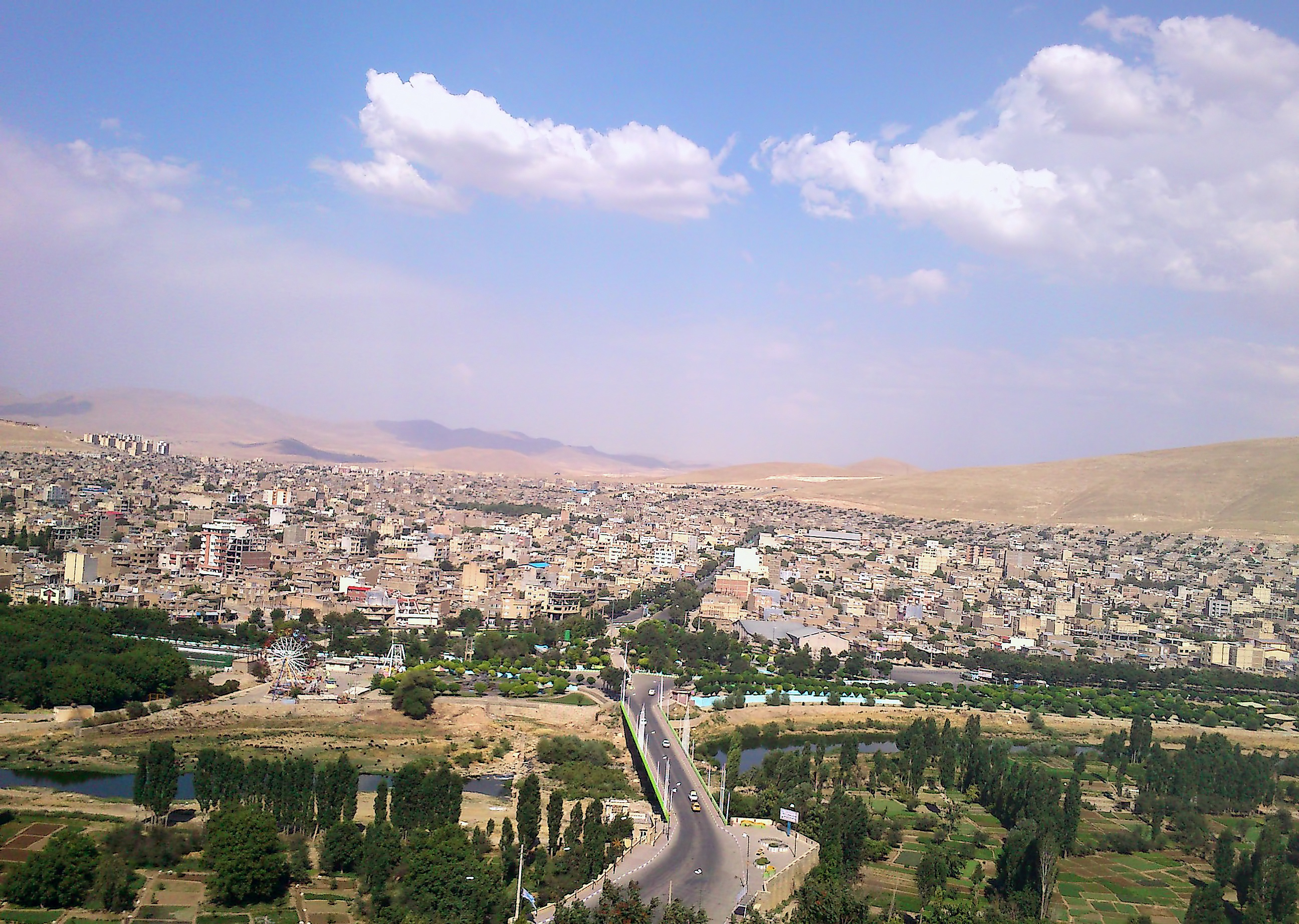 iran,bukan city (بوکان)